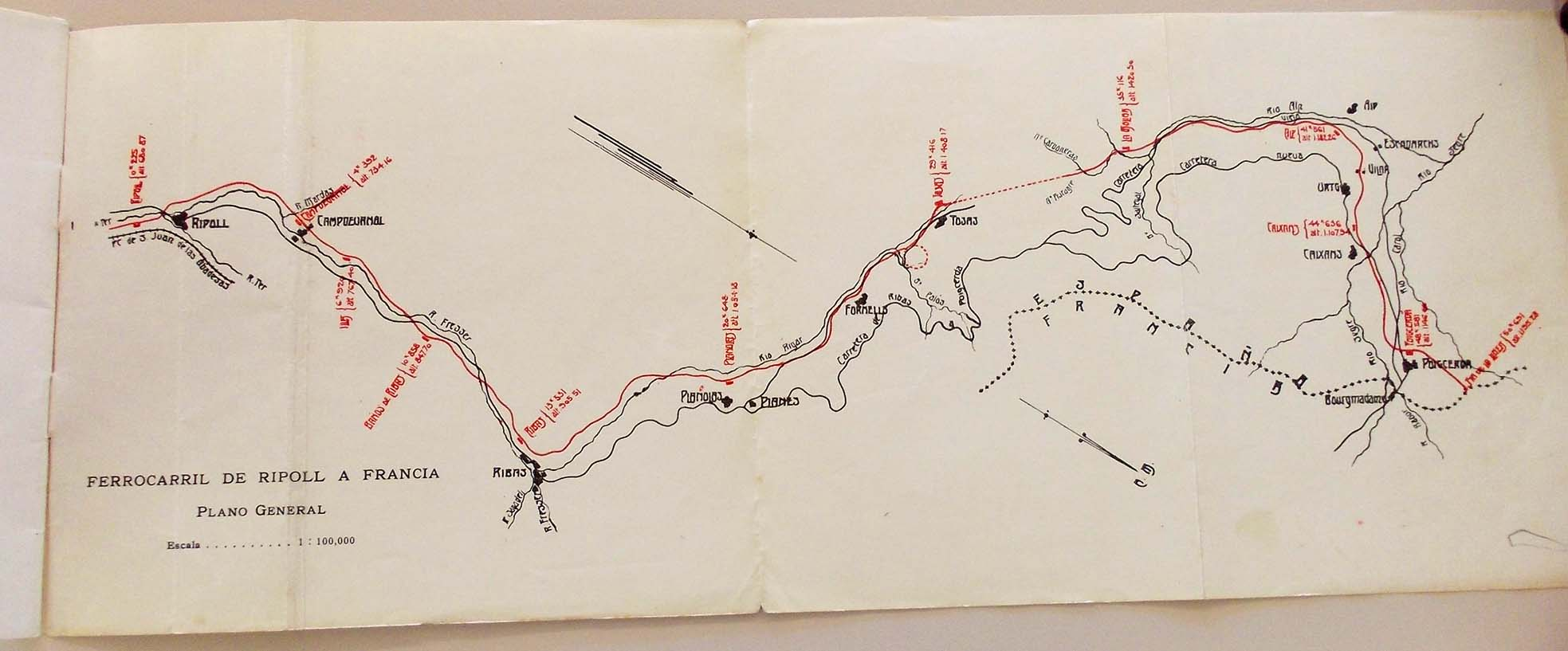 Foto del Traçat Ripoll Puigcerdà